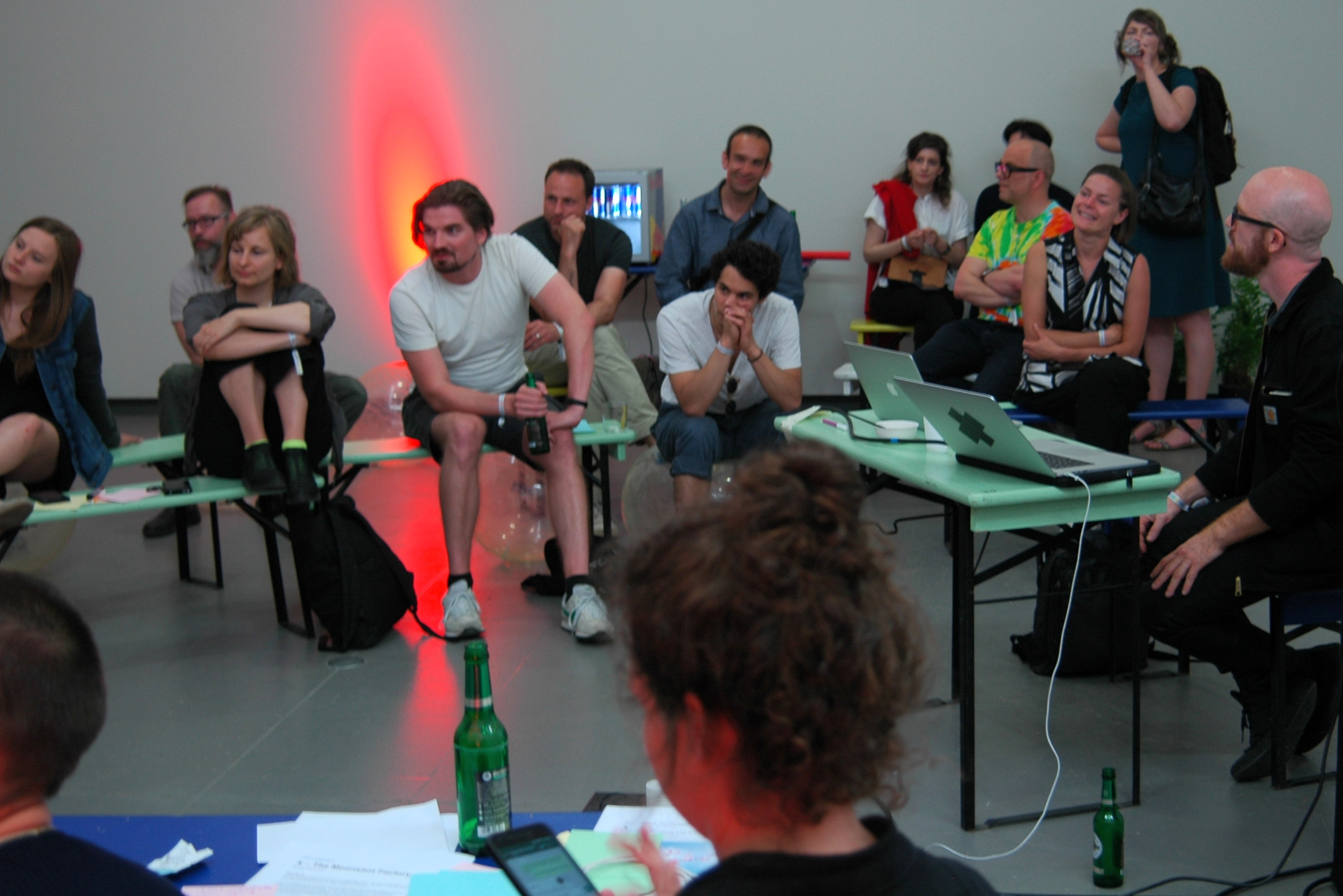 NRW-FORUM DÜSSELDORF, META Marathon, Global village discussion